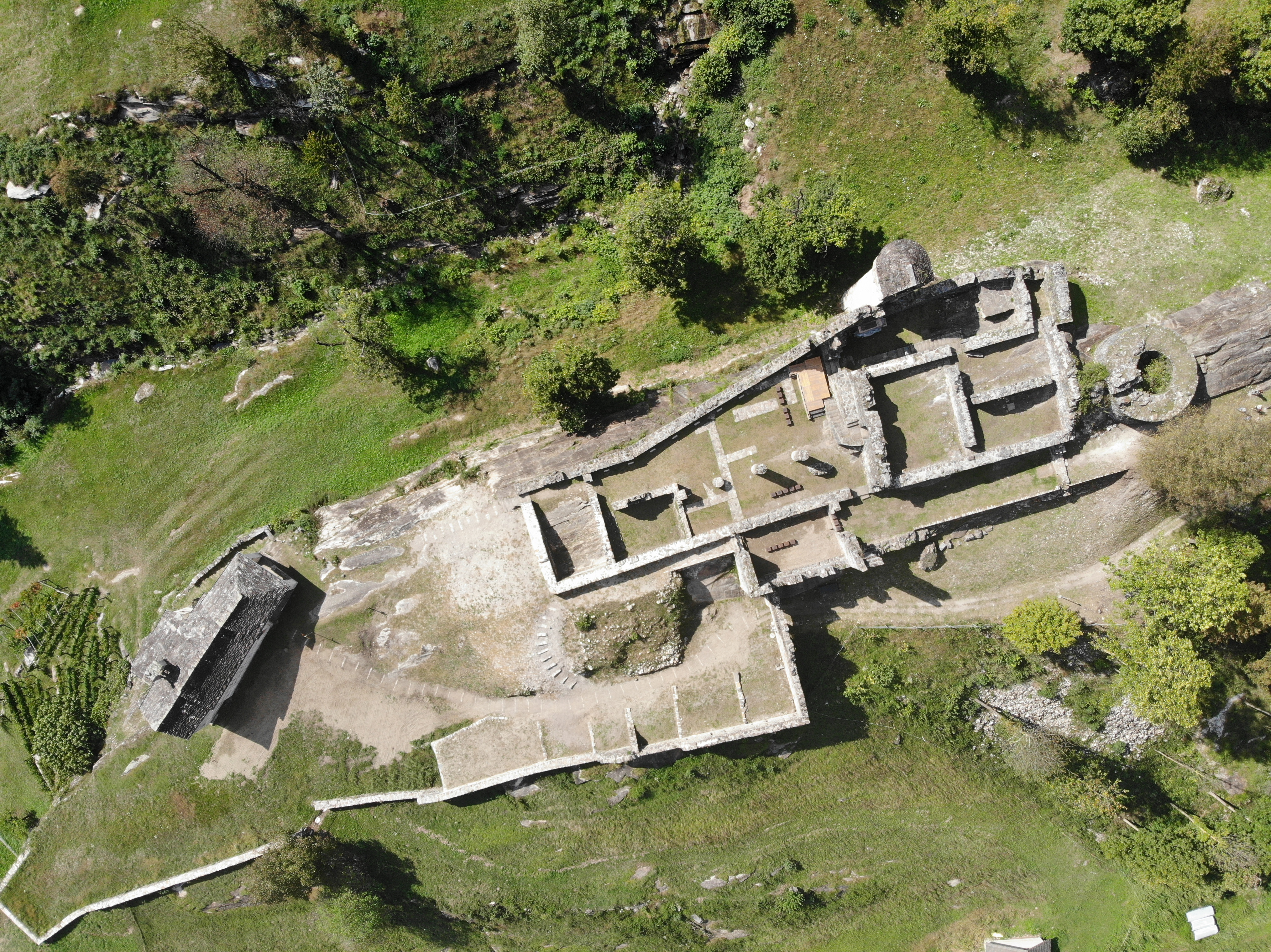 Serravalle (Burg) Aufsicht